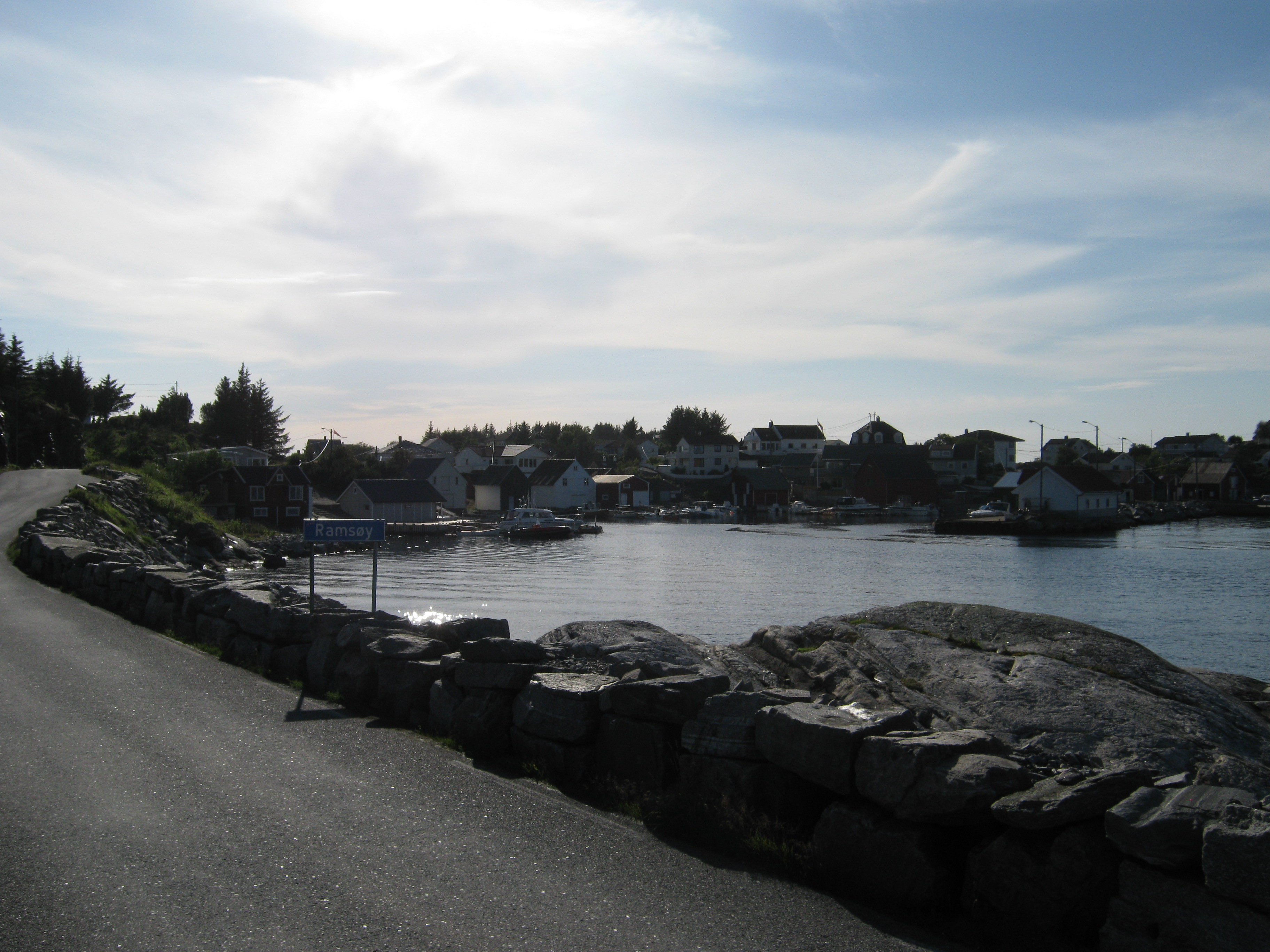 Skiltet "Ramsøy" med Marina i bakgrunnen.